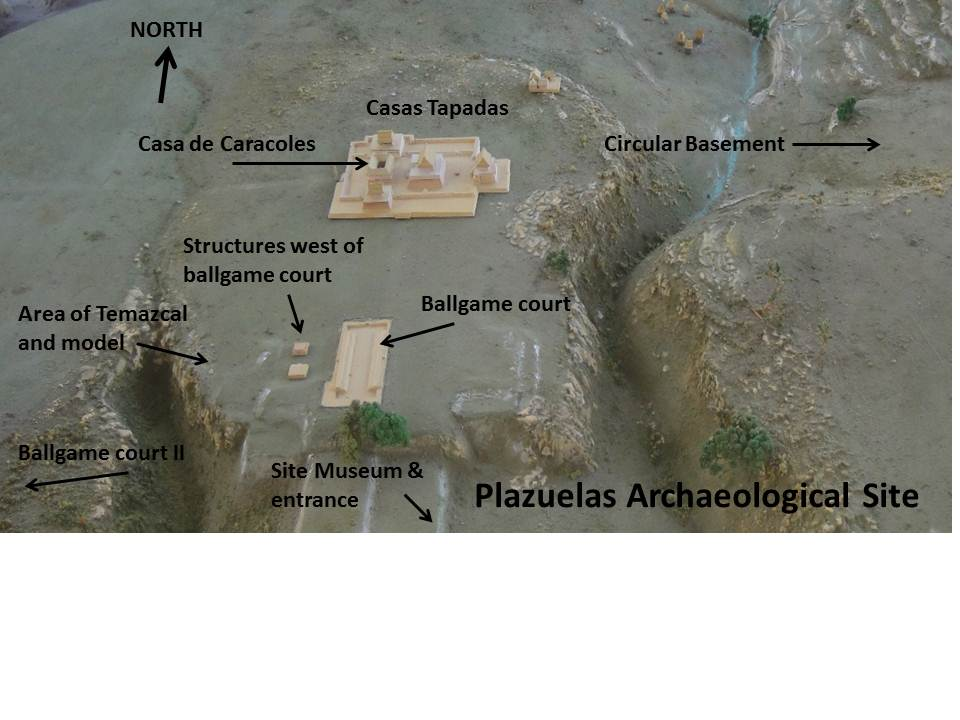 Template:Plazuelas site museum model